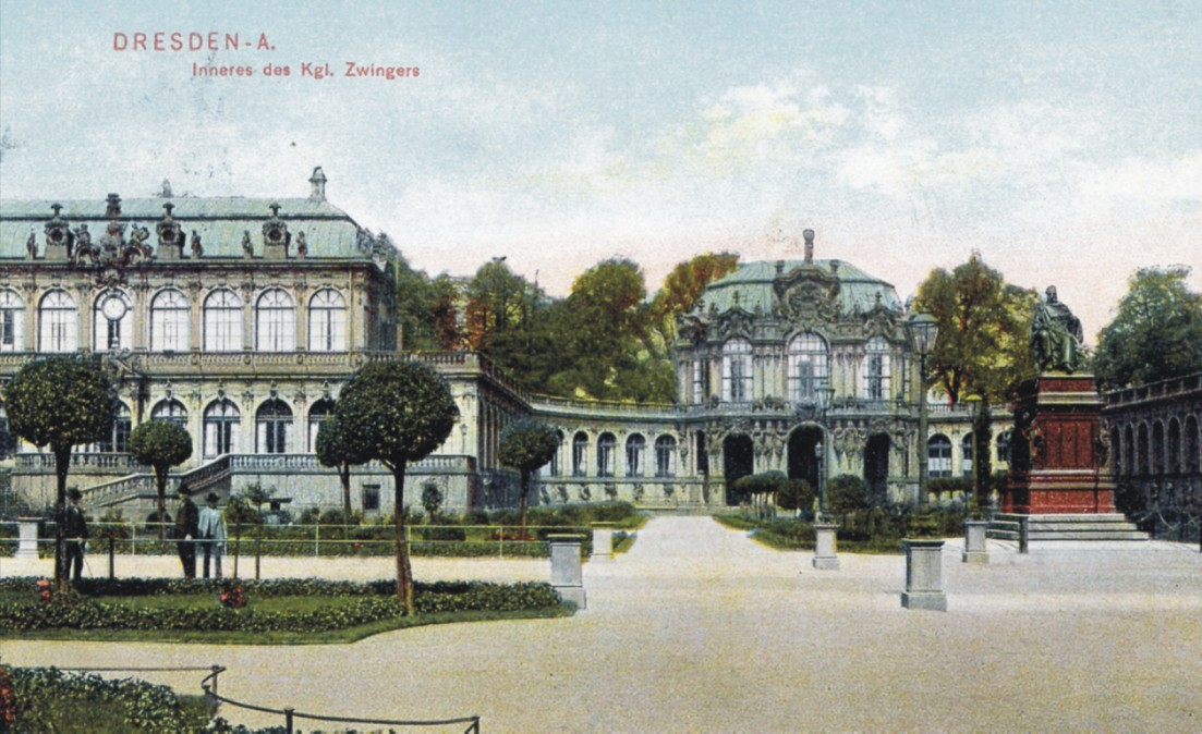 Zwinger, Dresden (Postkarte)